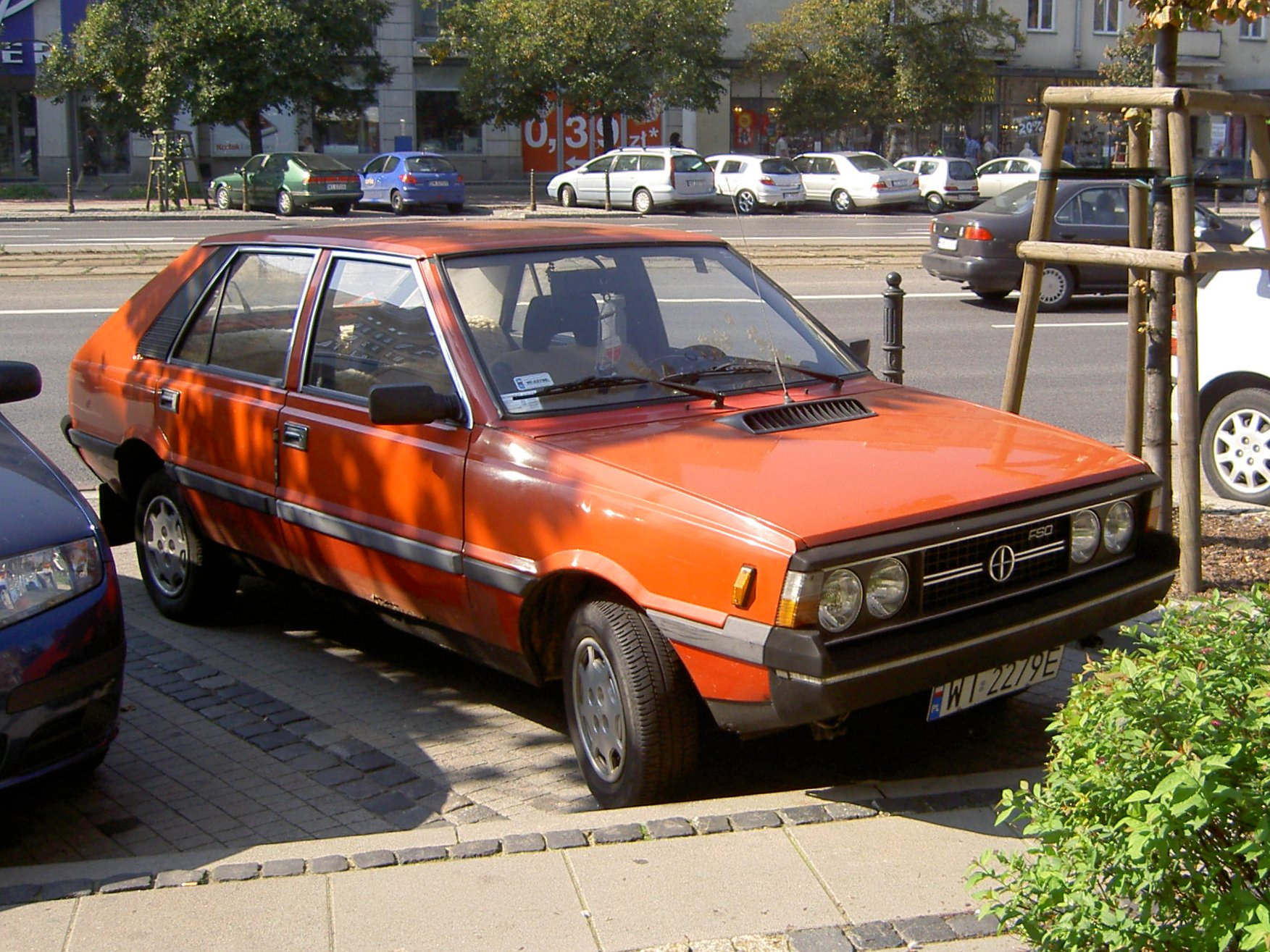 FSO Polonez MR'83 parked on Marszałkowska street in Warsaw